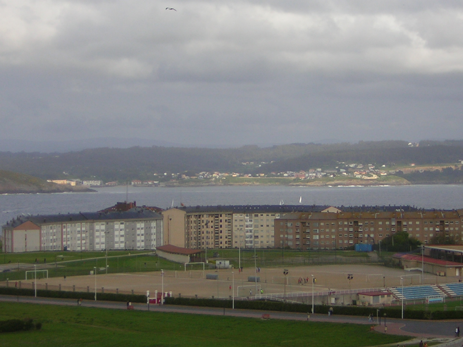 Campos de fútbol da Torre (A Coruña).